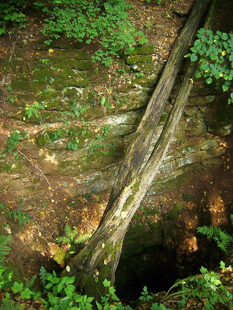 Detail ústia priepasti v údolí Szalayovho jazera na Silickej planine v Slovenskom krase. Je to jediná jaskyňa v Slovenskom krase, ktorú budujú vrstevnaté strednotriasové schreyeralmské vápence, ktorých lavice v ústí výrazne vystupujú.